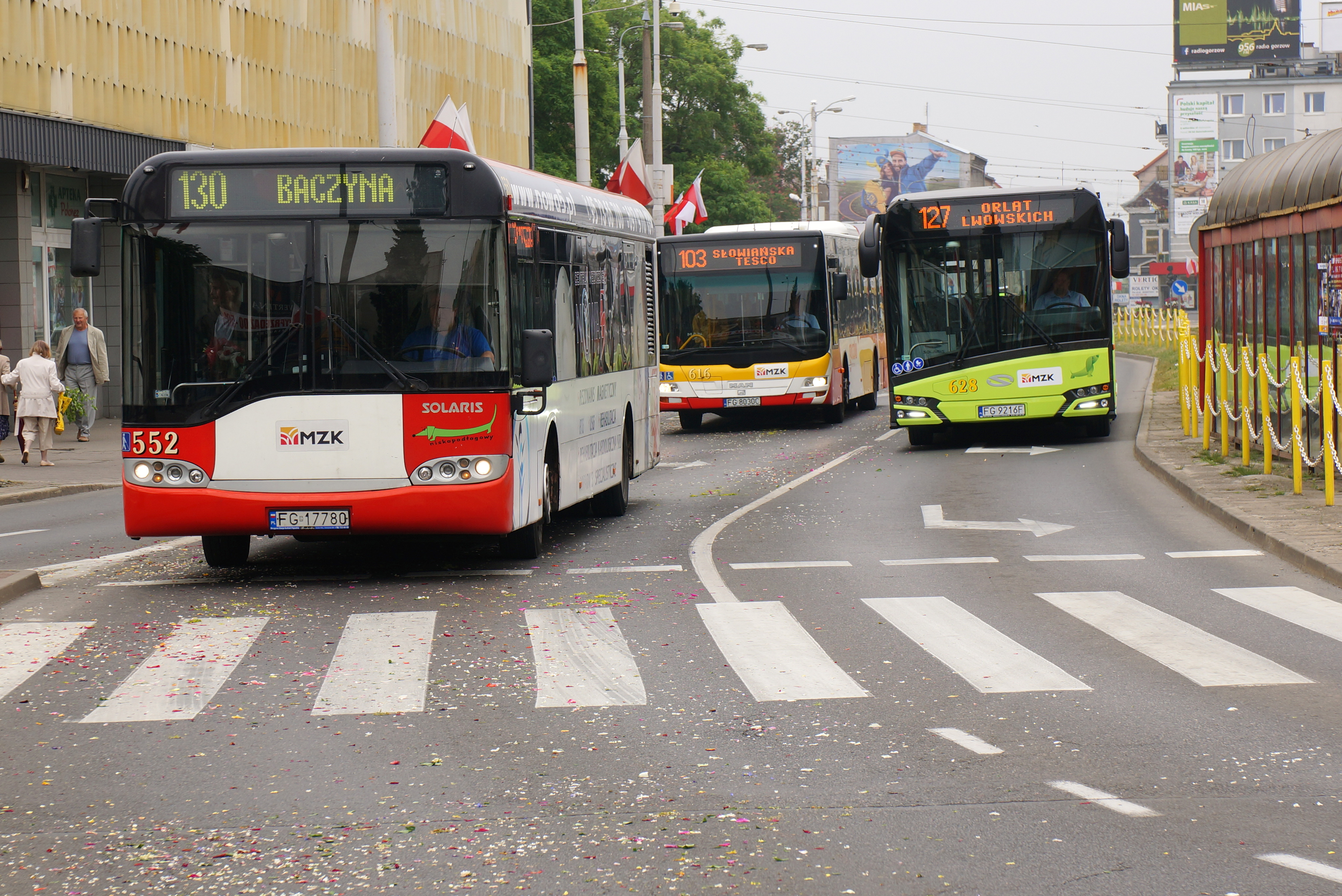 Gorzów Wlkp. Dwa Solarisy Urbino 12, trzeciej (#552) i czwartej (#628) generacji oraz MAN NL263 Lion's City (#616) pod Arsenałem na ul. Chrobrego.